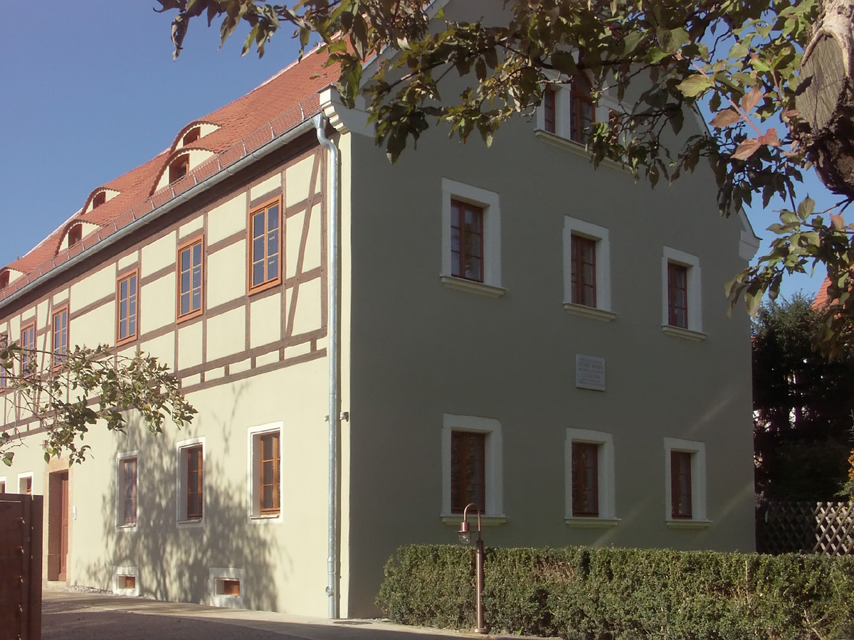 Schäfersches Gut (Lohengrinhaus) in Graupa